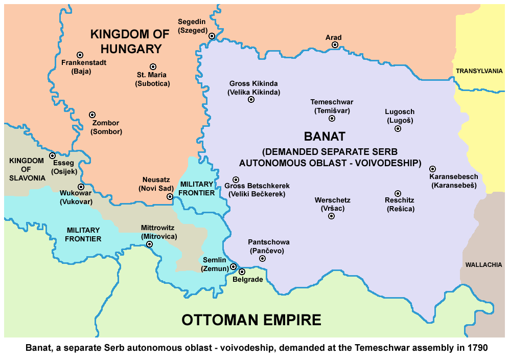 Banat, a separate Serb autonomous oblast - voivodeship, demanded at the Temeschwar assembly in 1790. Банат, посебна српска аутономна област - војводство, тражена на Темишварском сабору 1790. године.